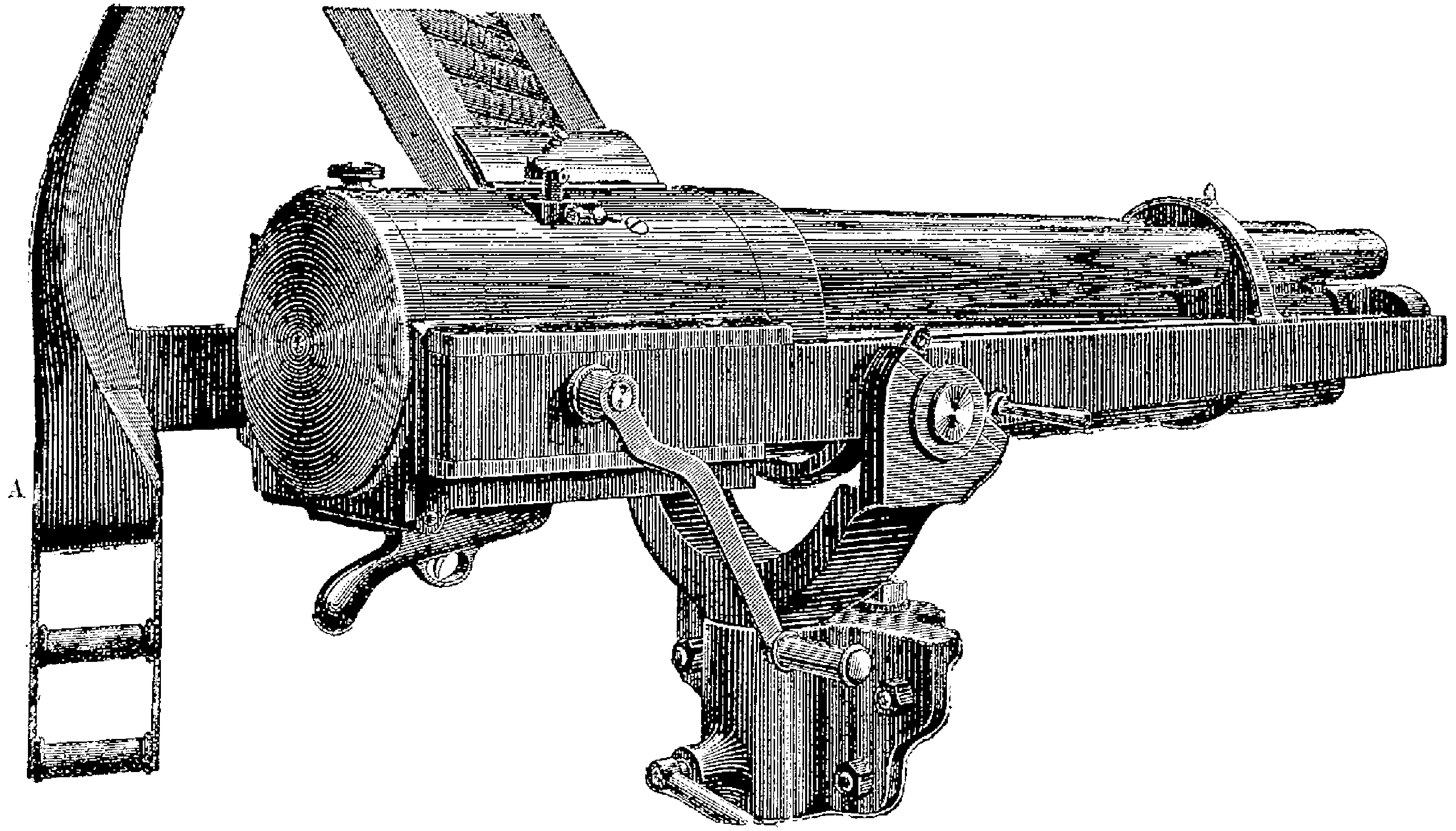 Mitrailleuse Hotchkiss, pour la défense des places (pièce fixe)